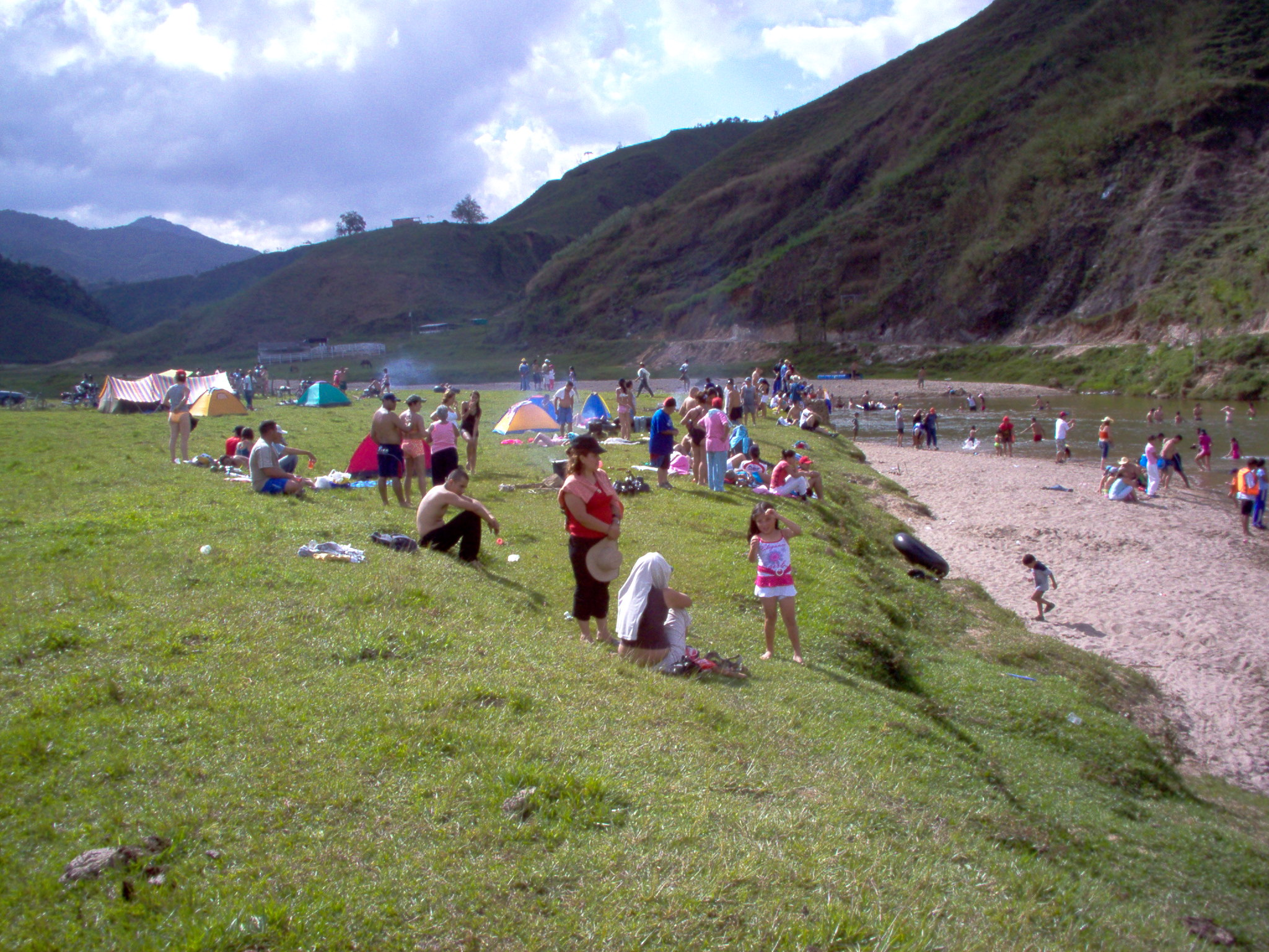 Bote Paseo en el rio Nare